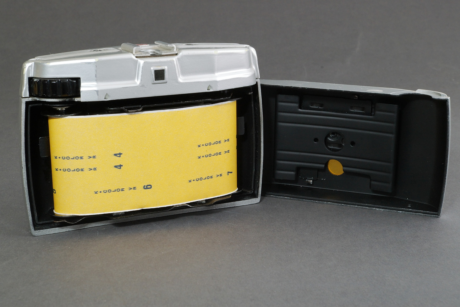 Bilora Bella 44, Rückwand geöffnet mit eingelegtem Film, Kamera für Rollfilm 127, Druckgussgehäuse, Achromat, Schnappverschluß 1/100s, 1/50s und B, Blitzsynchronkontakt, Auslösesperre